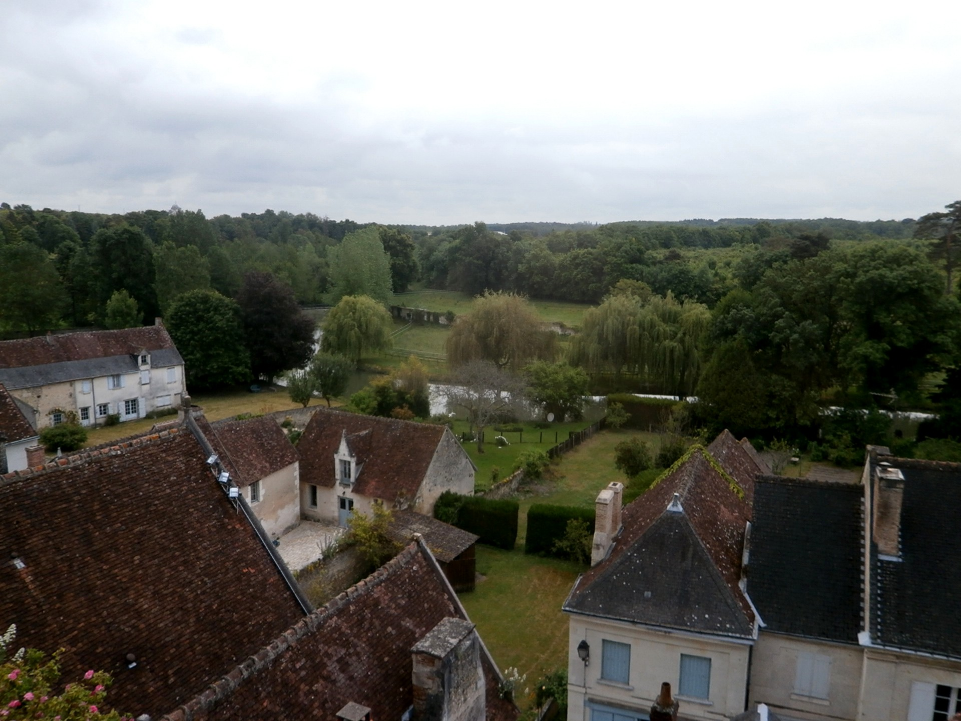 La vallée de l'Indrois, vue depuis l'esplanade du château de Montrésor.